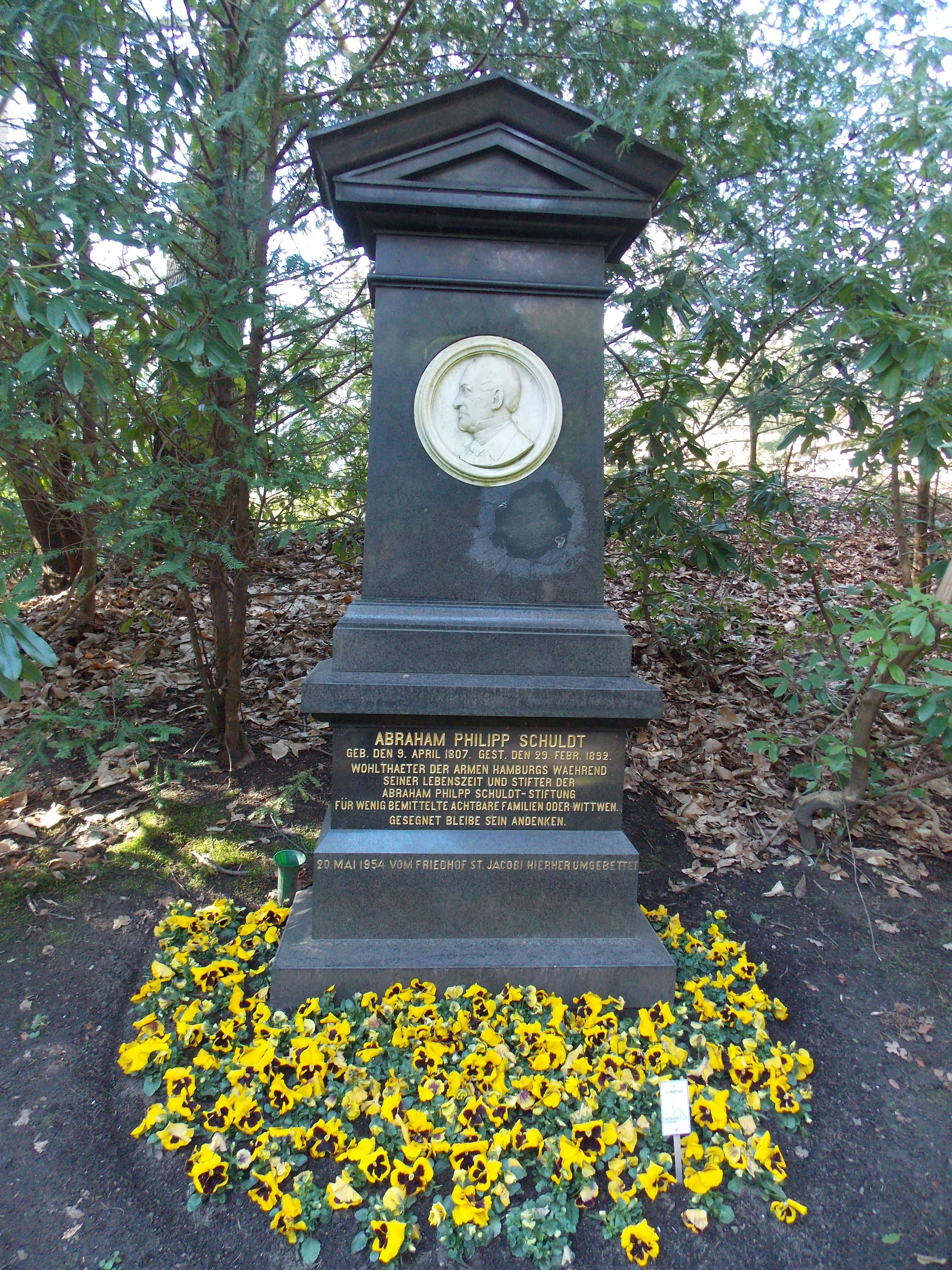 Grabmal von Abraham Philipp Schuldt auf dem Ohlsdorfer Friedhof